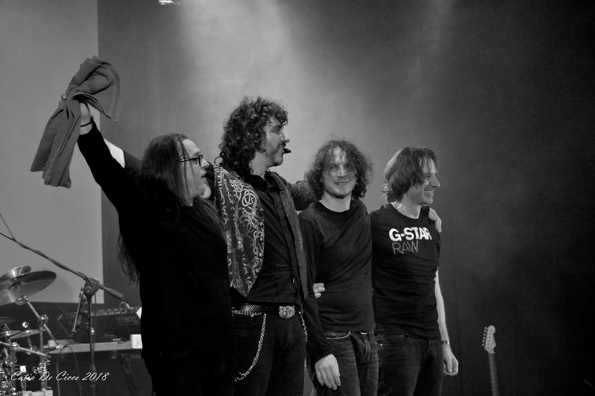 Offizielles Bandfoto